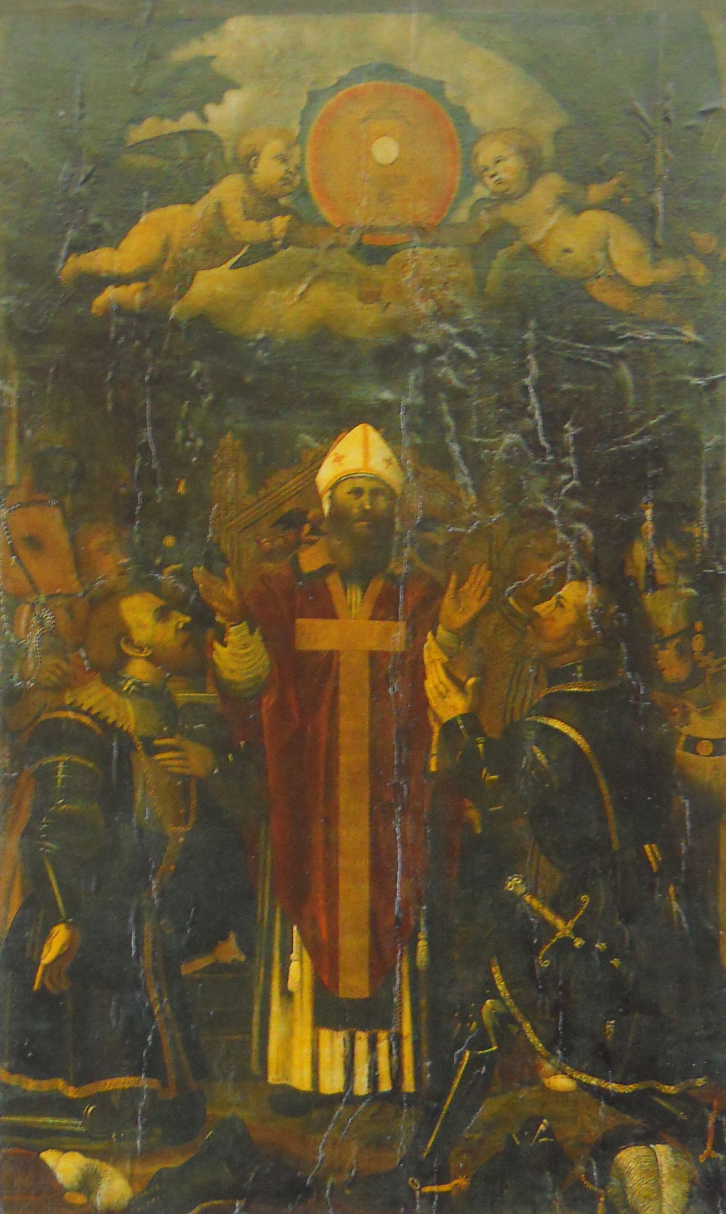 Stendardo processionale del Santissimo Sacramento (copia)